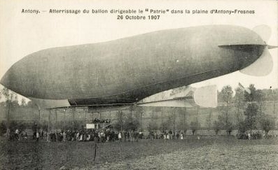 Antony. - Atterissage du ballon dirigeable le "Patrie" dans la plaine d'Antony-Fresne 26 octobre 1907, carte postale.